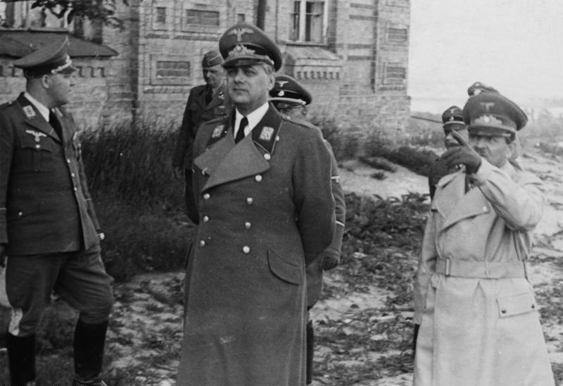 Kiew: Besuch des Reichsleiters Rosenberg in Kiew. Besichtigung der Lawra